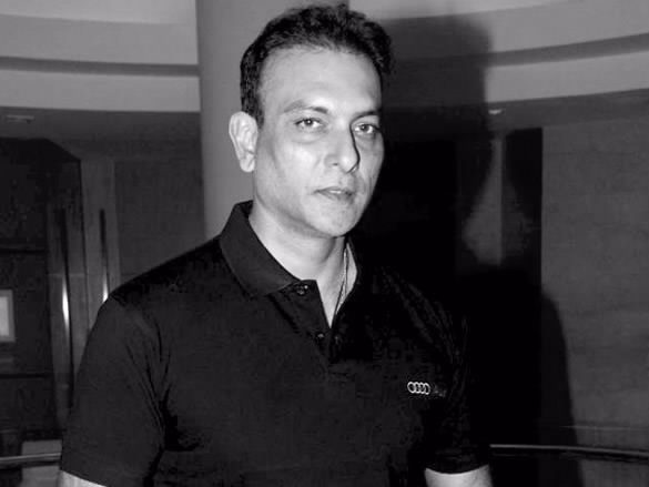 Ravi Shastri at Audi magazine launch